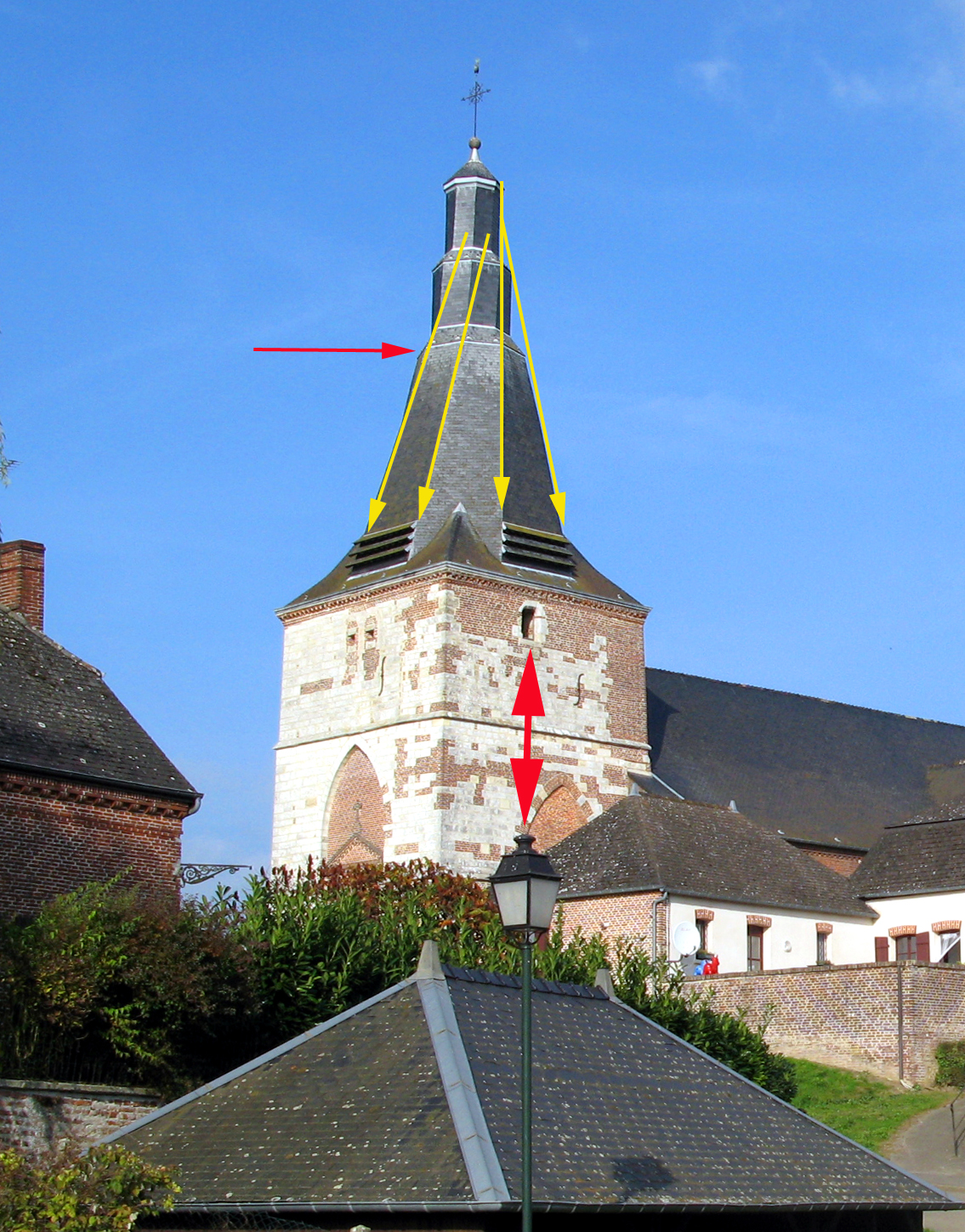 Dohis (Aisne, France) - L'église fortifiée est surmontée d'un «clocher tors» qui présente la particularité de faire profiter l'observateur (quels que soient son angle de vue ou sa position autour de l'édifice) d'un effet d'optique. La face la plus à gauche de la partie inclinée de la flèche du clocher semble avoir des arêtes parallèles. En fait, l'observateur voit parfois à gauche un parallélogramme !